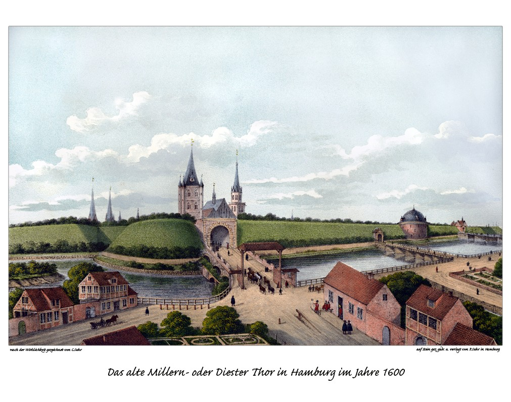 Das alte Millern- oder Diester Thor in Hamburg im Jahre 1600, gezeichnet von Christoffer Suhr, Litho von Peter Suhr